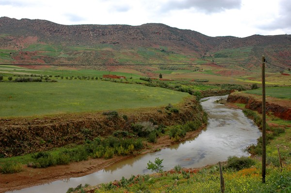 Oum Er-Rbia